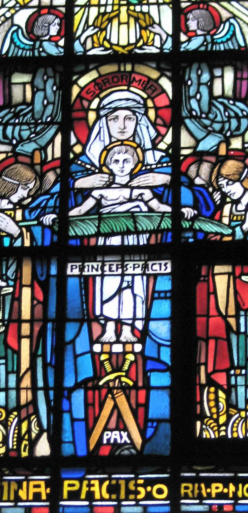 Fënster an der Kierch zu Beetebuerg